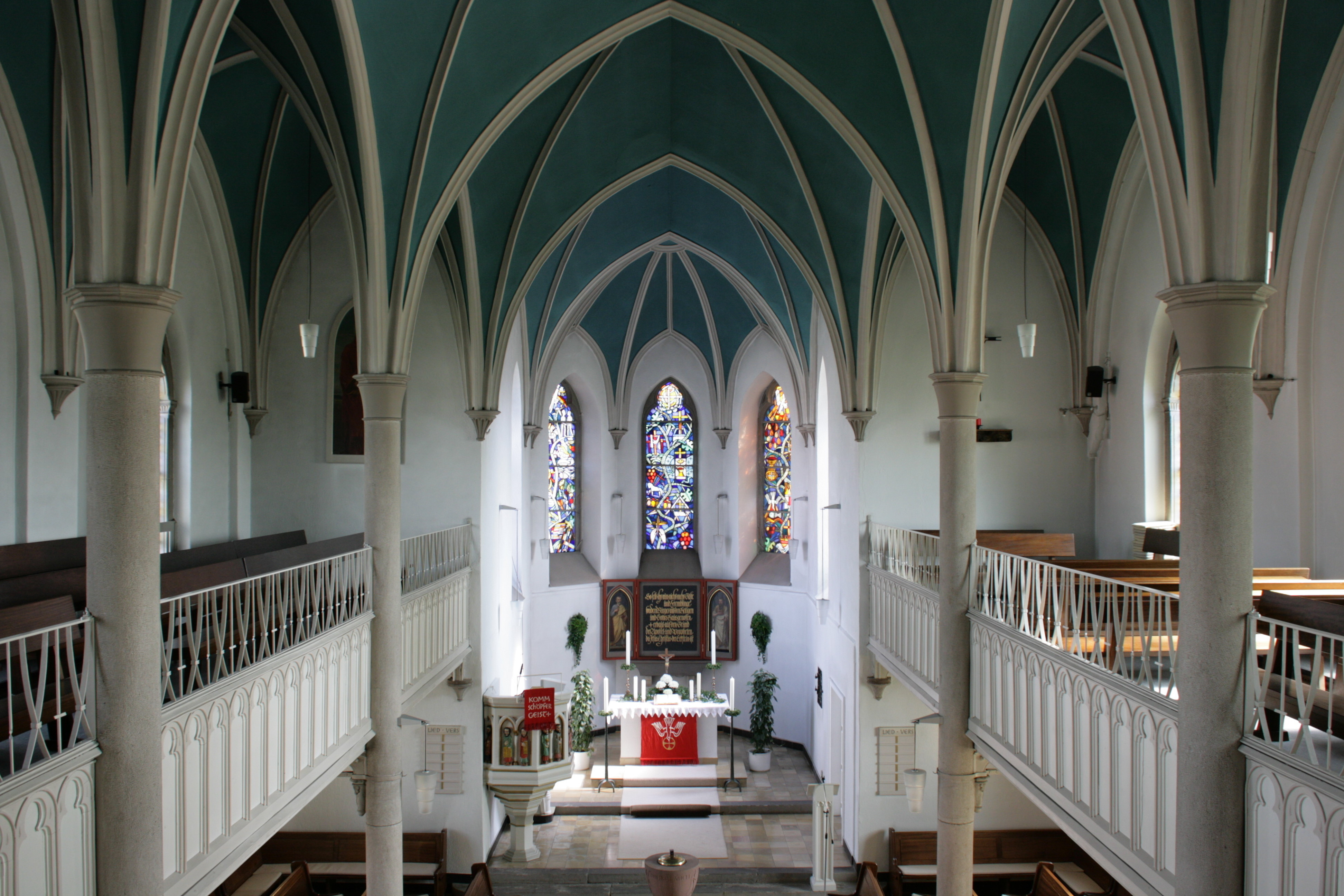 Kirche Herzkamp, Barmer Straße in Sprockhövel